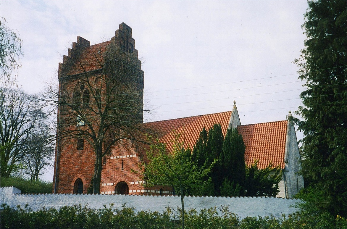 Brødnbyvester Kirke